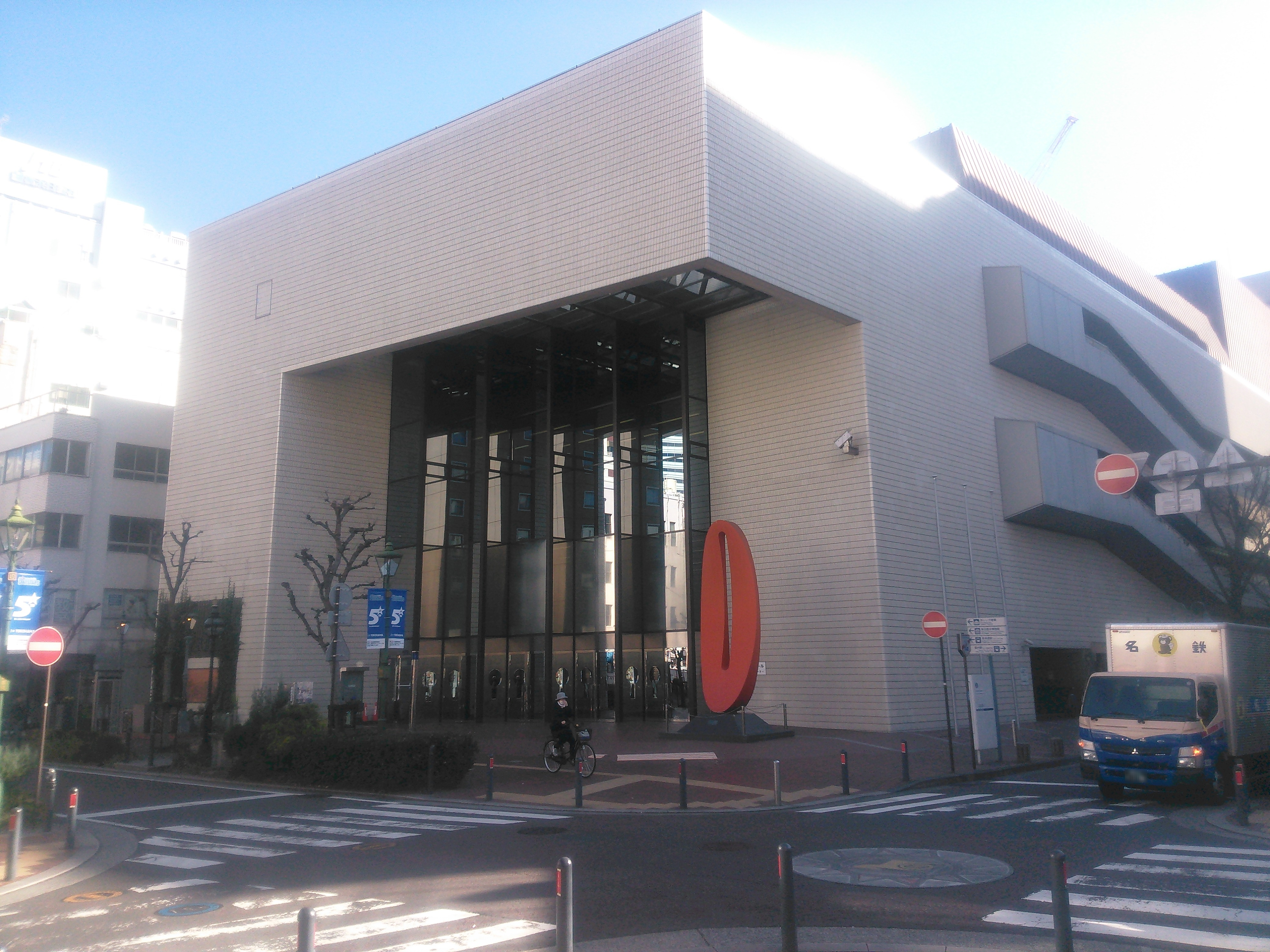 横浜・関内ホール